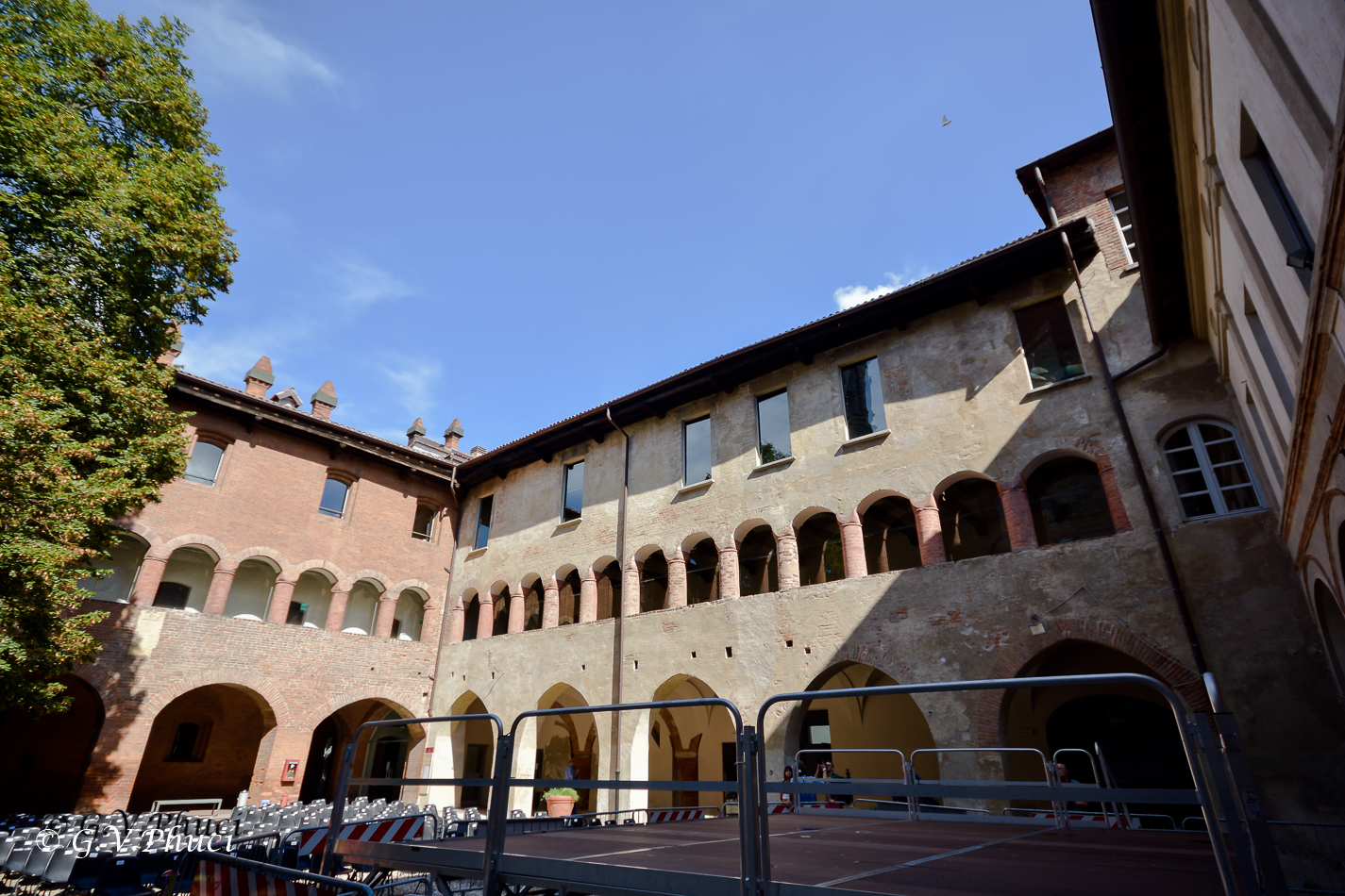 Palazzo Broletto This is a photo of a monument which is part of cultural heritage of Italy.